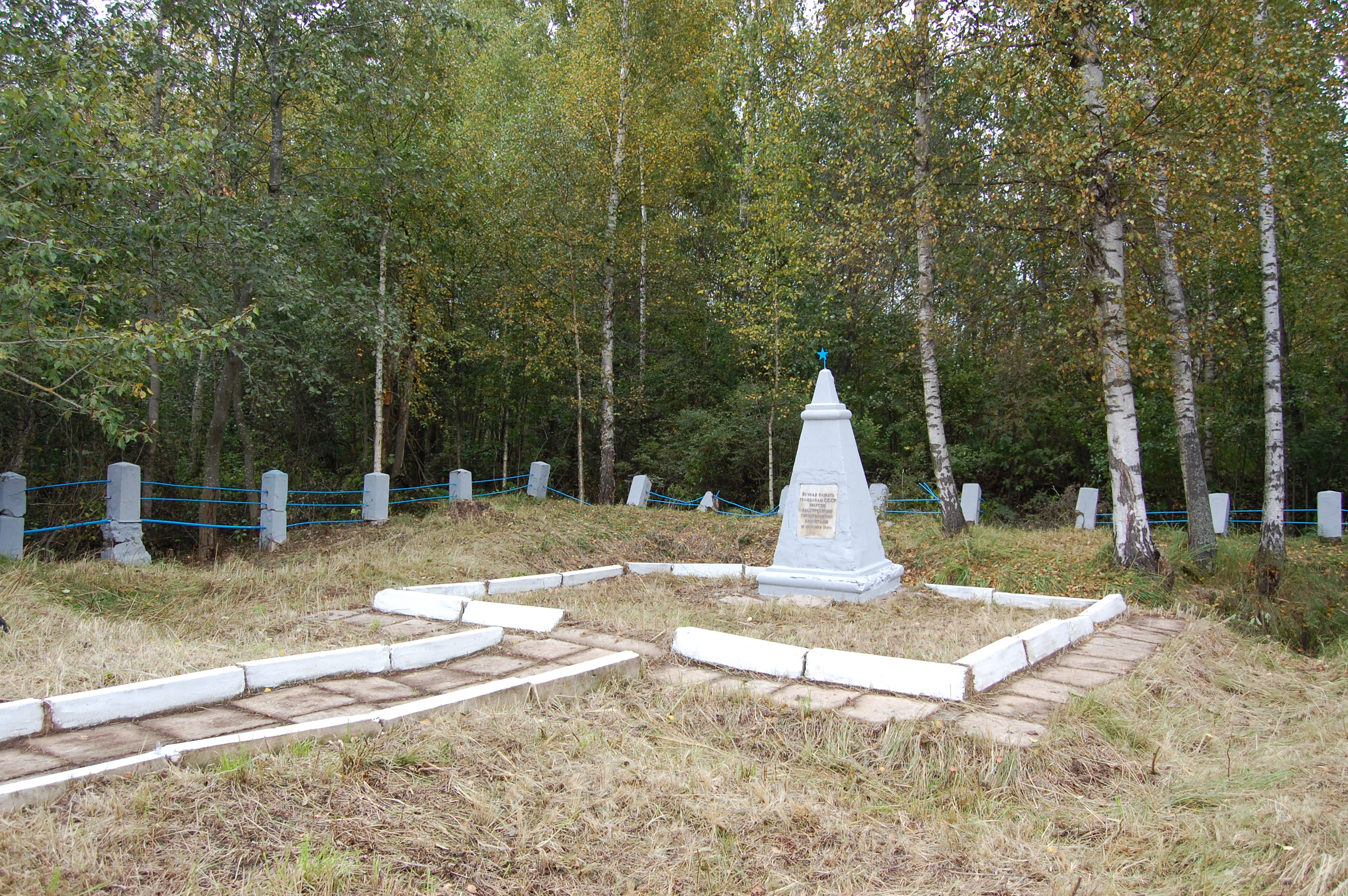 Старый памятник убитым евреям Яновичского гетто у деревни Зайцево. Расположен примерно в 50 метрах от основного памятника.